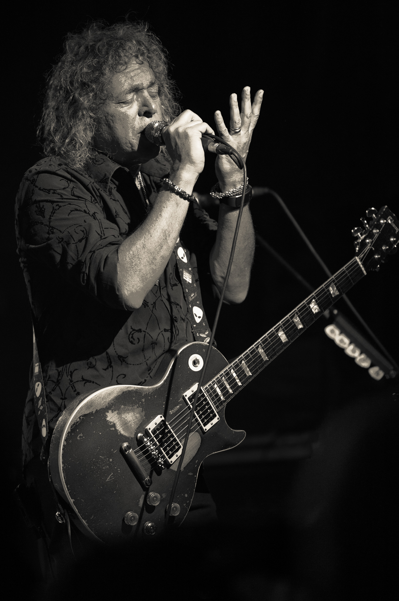 Concertbüro Franken,Dave Meniketti,Der Hirsch,Konzert,Livekonzert,Livemusik,Musik,Y&T